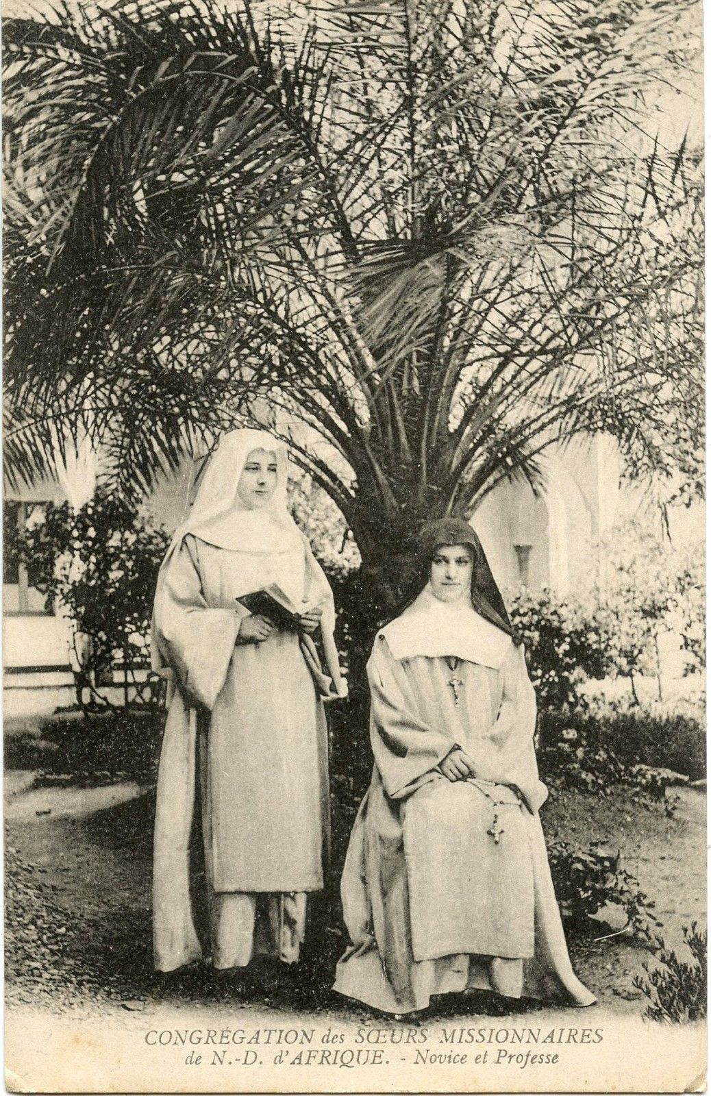 Sœurs de Notre-Dame d'Afrique: novice et professe (assise) au couvent d'Alger, entre 1915 et 1920.